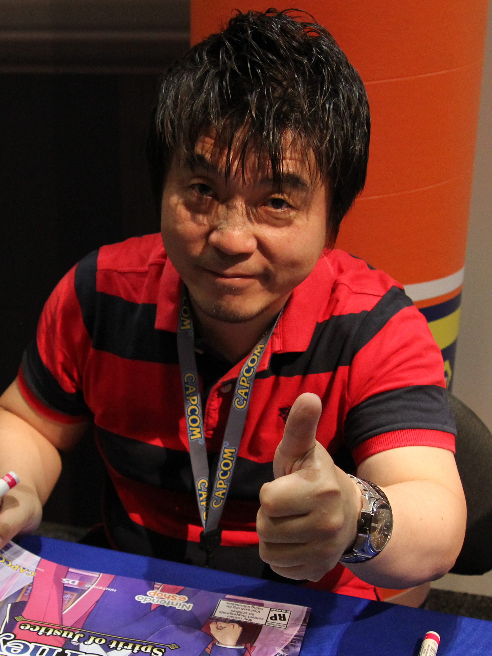 Video game producer Motohide Eshiro at Anime Expo 2016